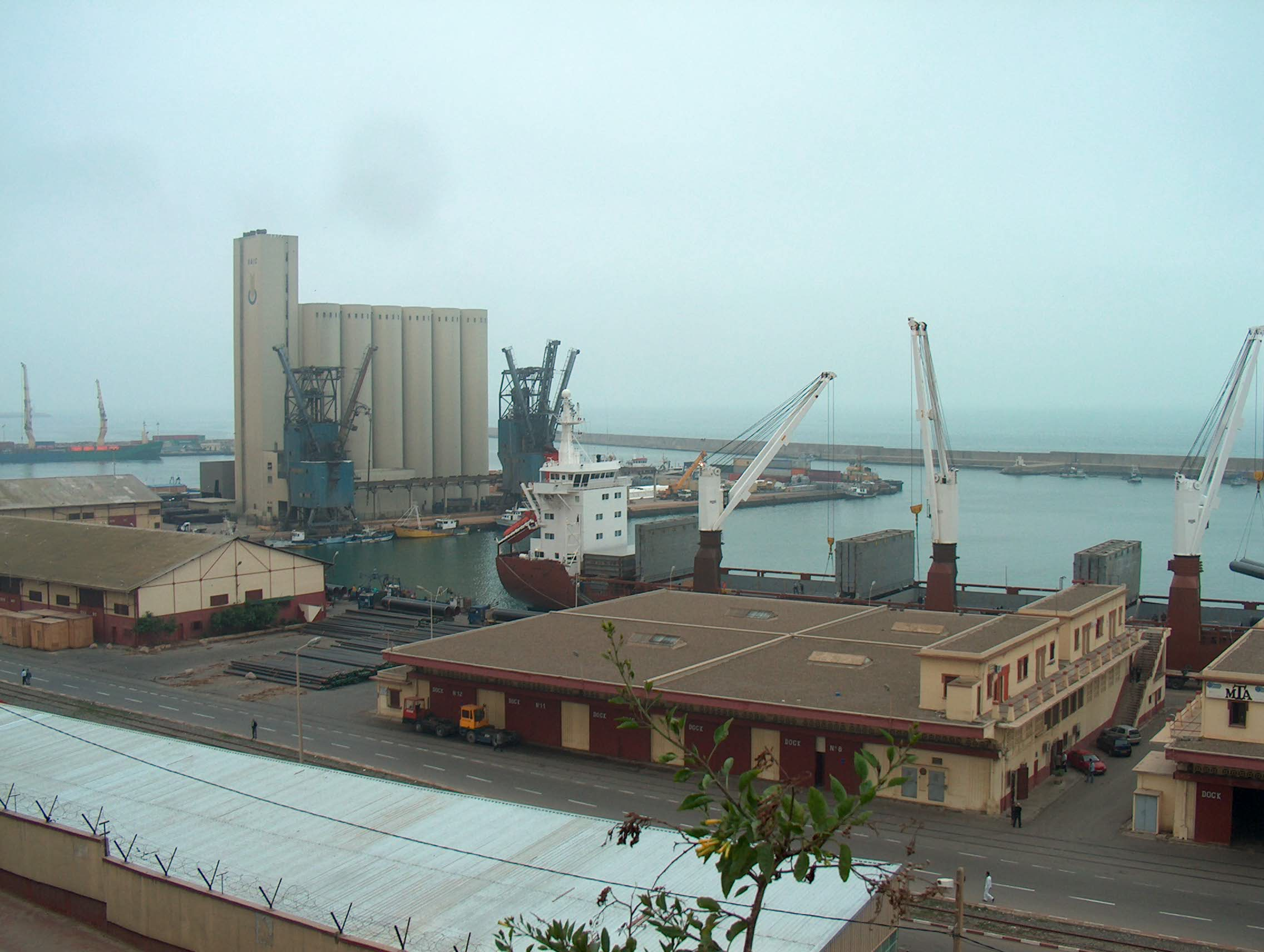 Port-of Mostaganem Algeria. Port de Mostaganem-Algérie.